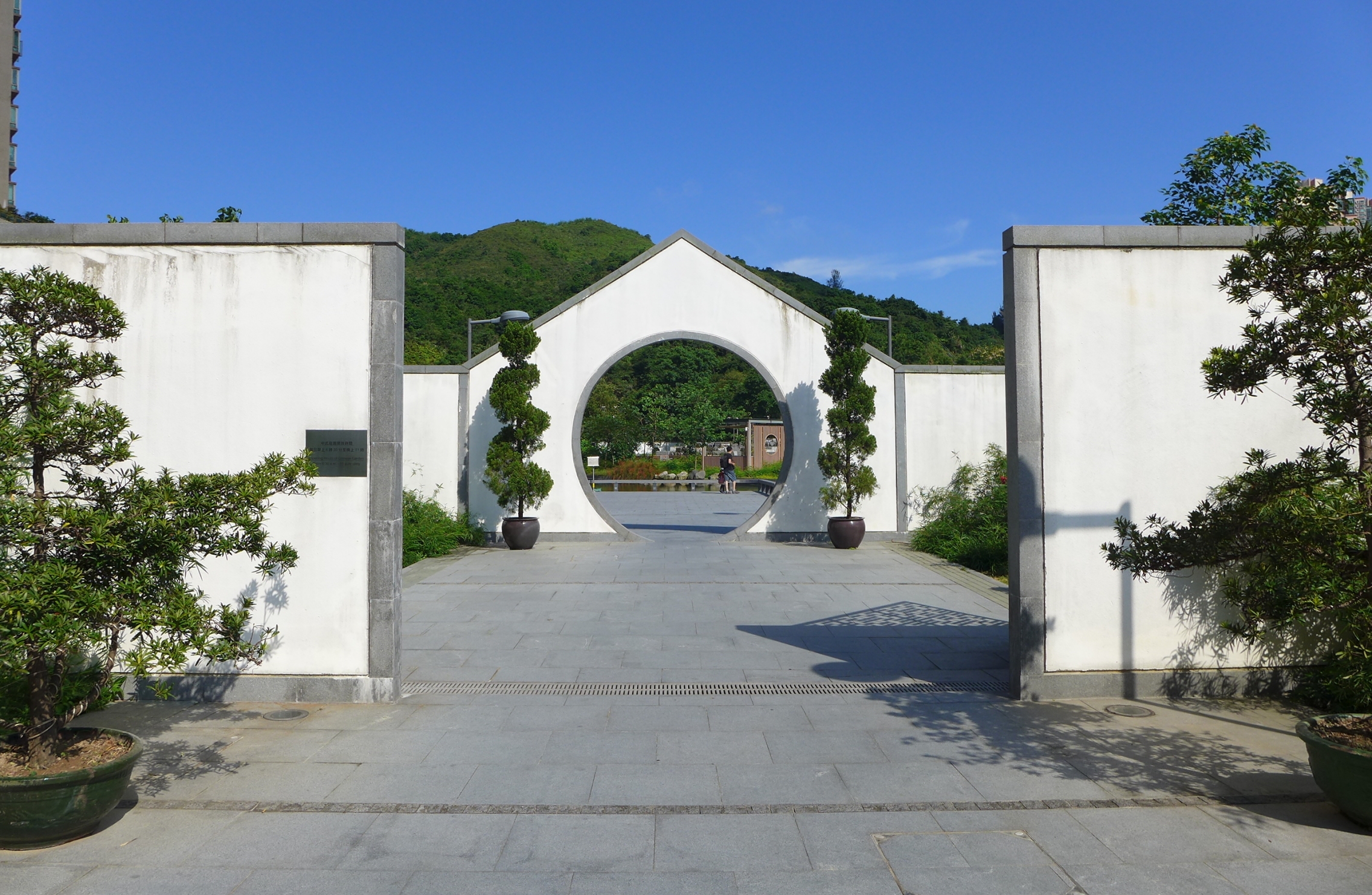 Man Kuk Lane Park Chinese Garden Entrance